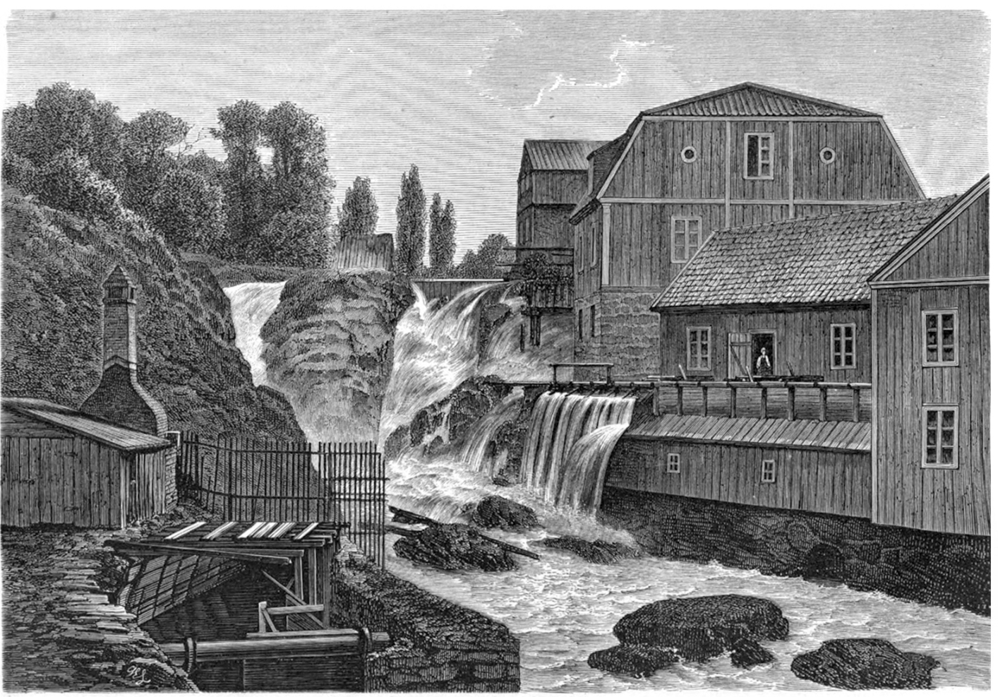 Djupafors, Ronneby